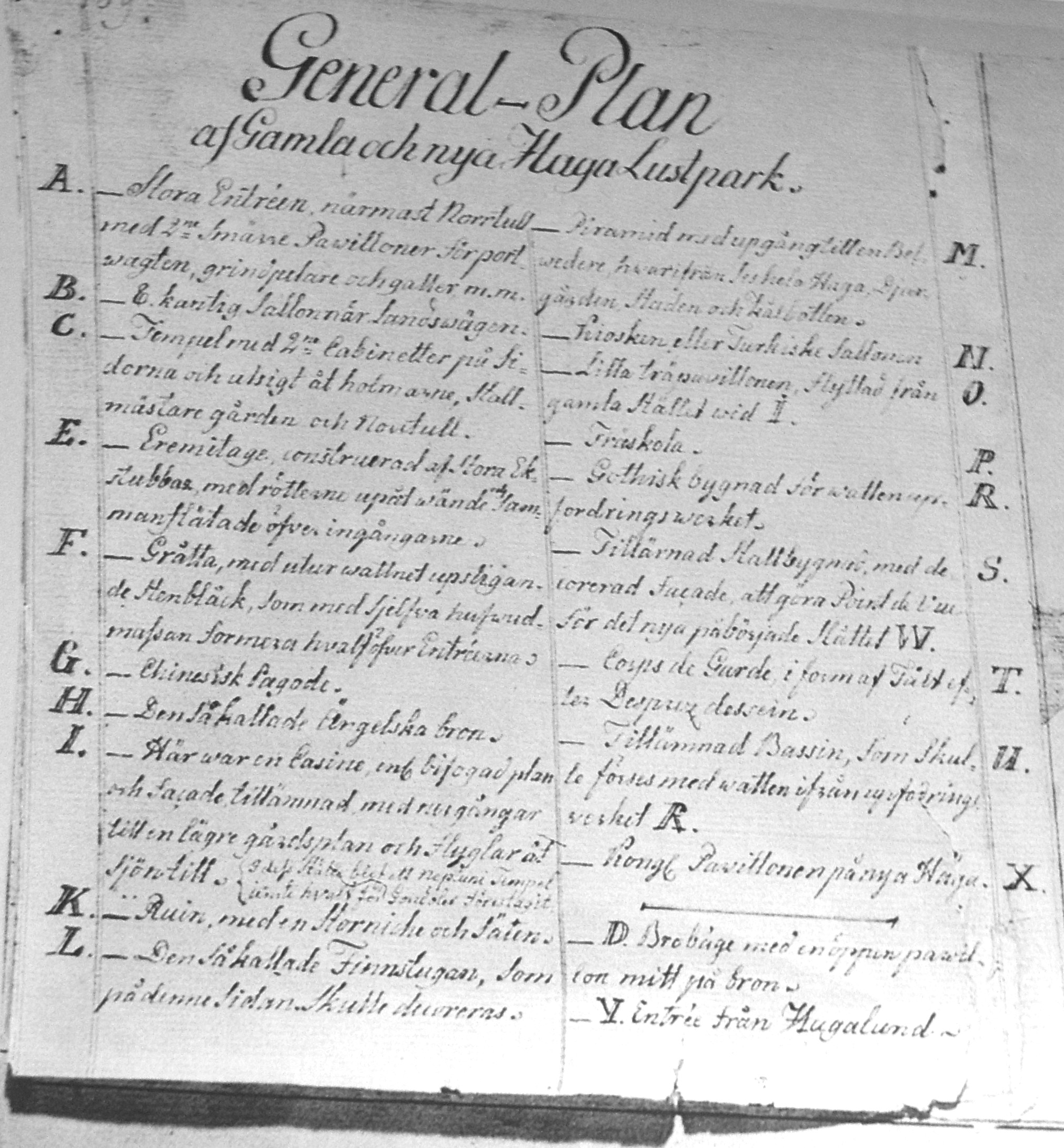 Pipers generalplan för Hagaparken, förklaringar